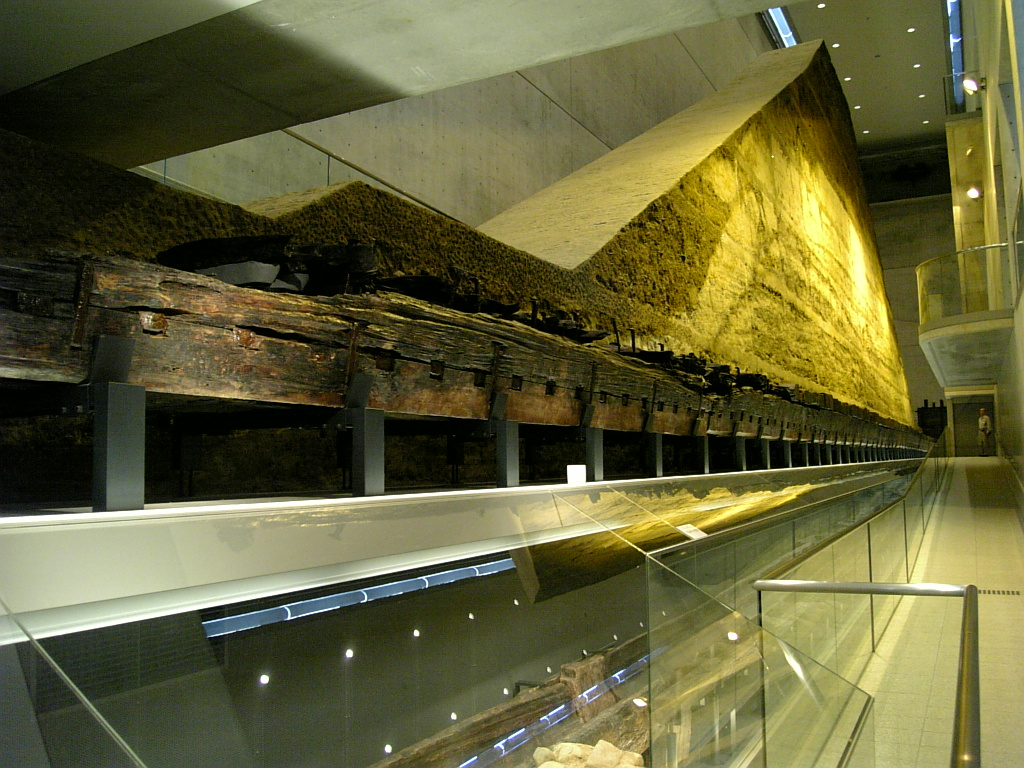 大阪府立狭山池博物館の代表的な展示物（堤のスライスと発掘した桶管）